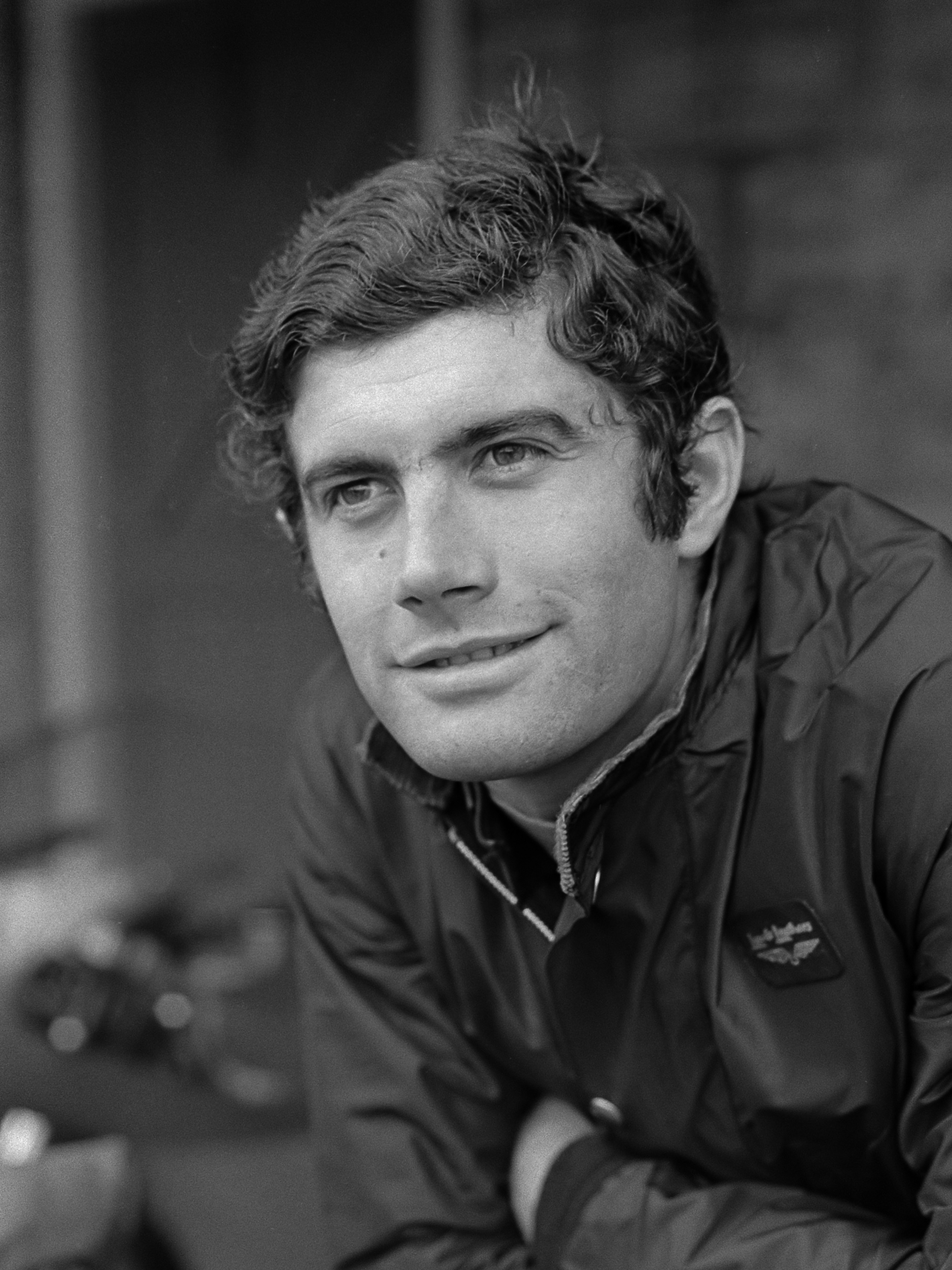 TT te Assen. Training. Agostini 27 juni 1968